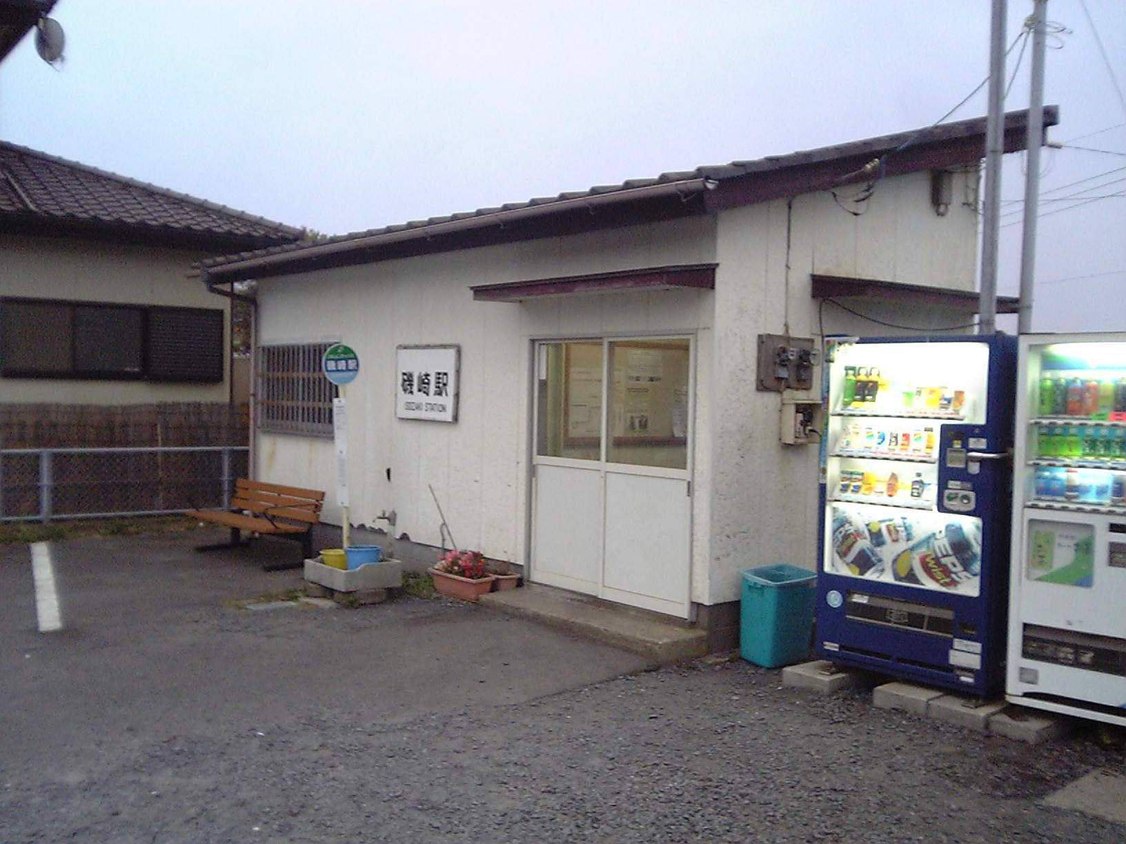 磯崎駅(2009/10/24撮影)